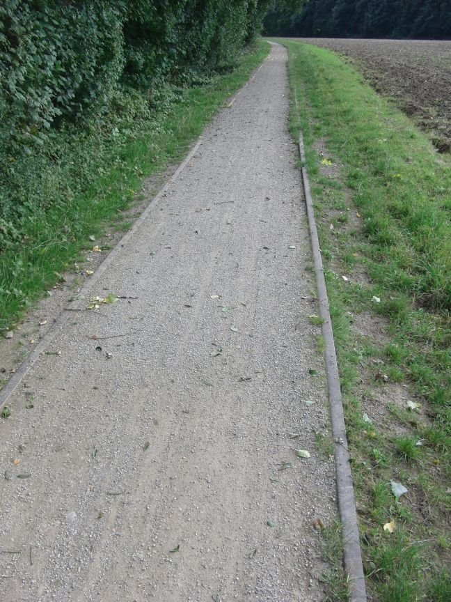 Streckenrest zwischen Lendersdorf und Schneidhausen der ehemaligen DKB-Ringbahn